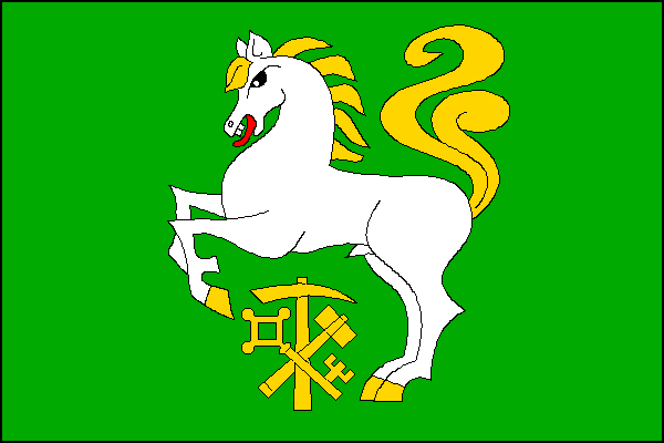 vlajka, Borušov, okres Svitavy